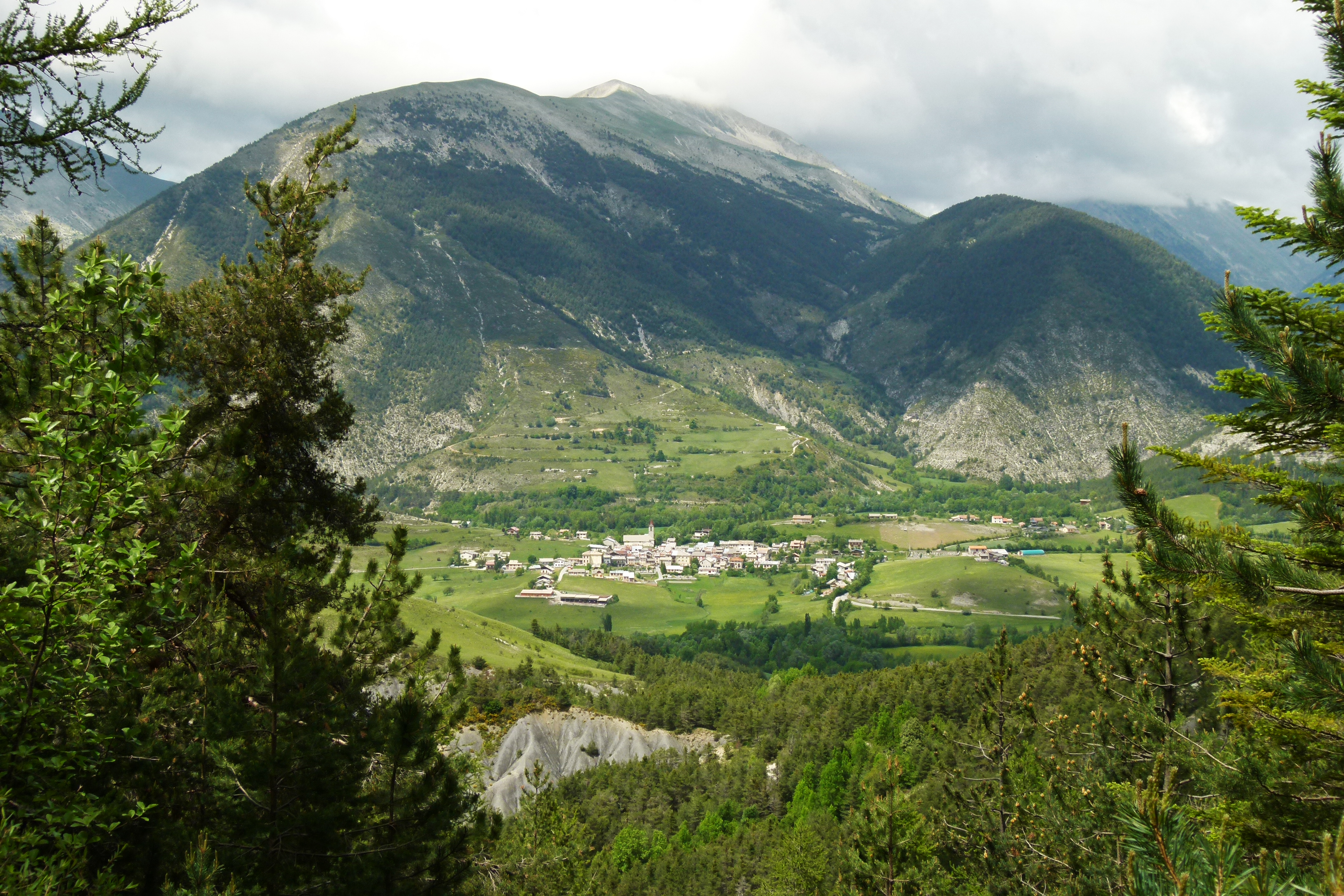 vue du village depuis le versant opposé en Mai 2011